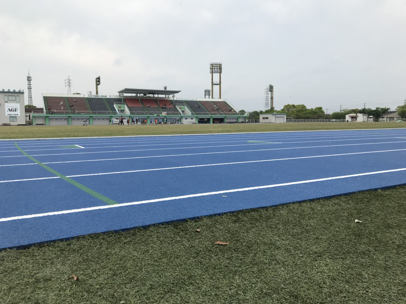 石垣池公園陸上競技場